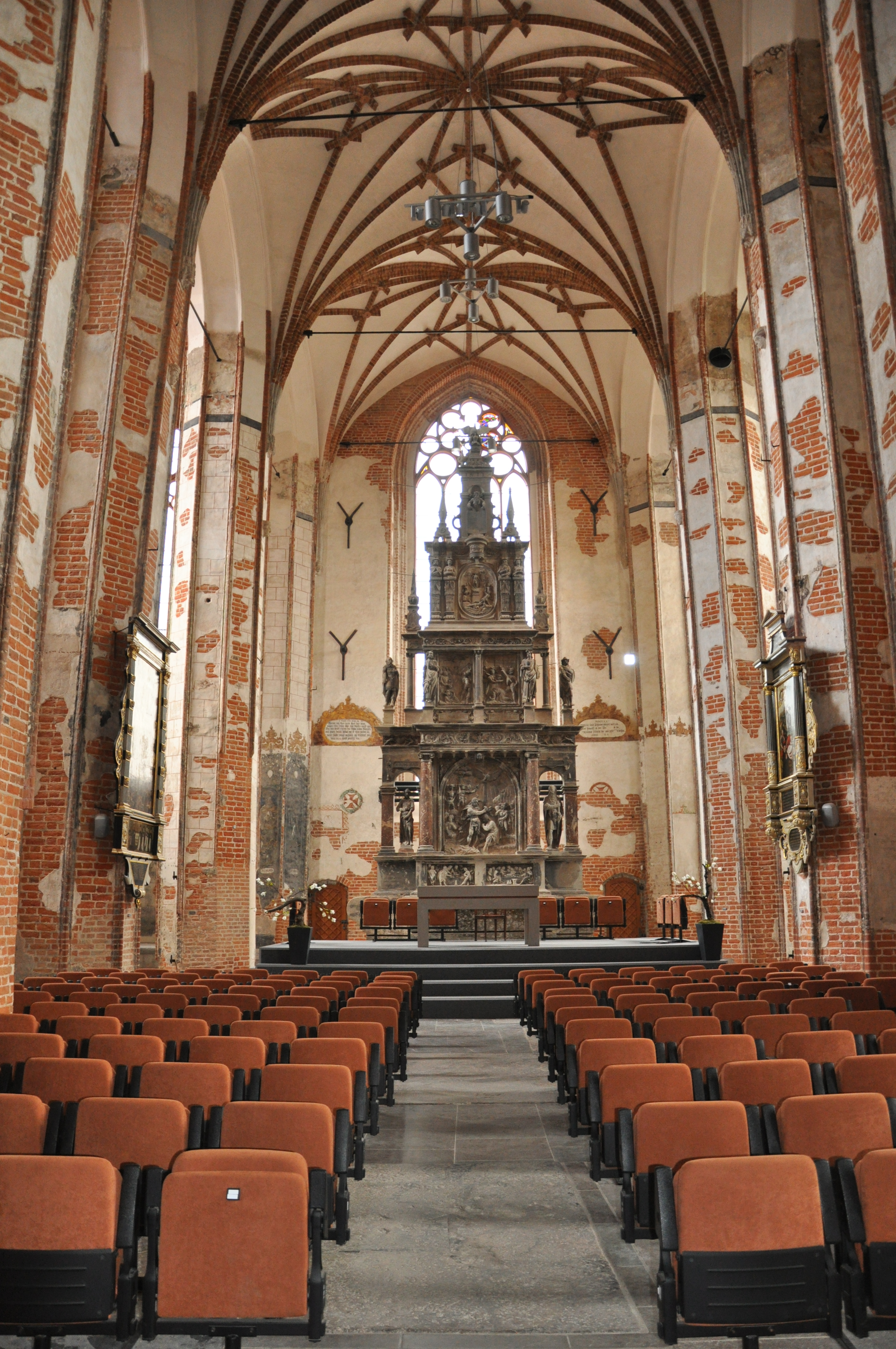 Gdańsk Główne Miasto, ul. Świętojańska 50 - rzymskokatolicki kościół rektorski, pw. św. Jana Chrzciciela i Jana Ewangelisty, poł. XIV, 1415-1465, 1969